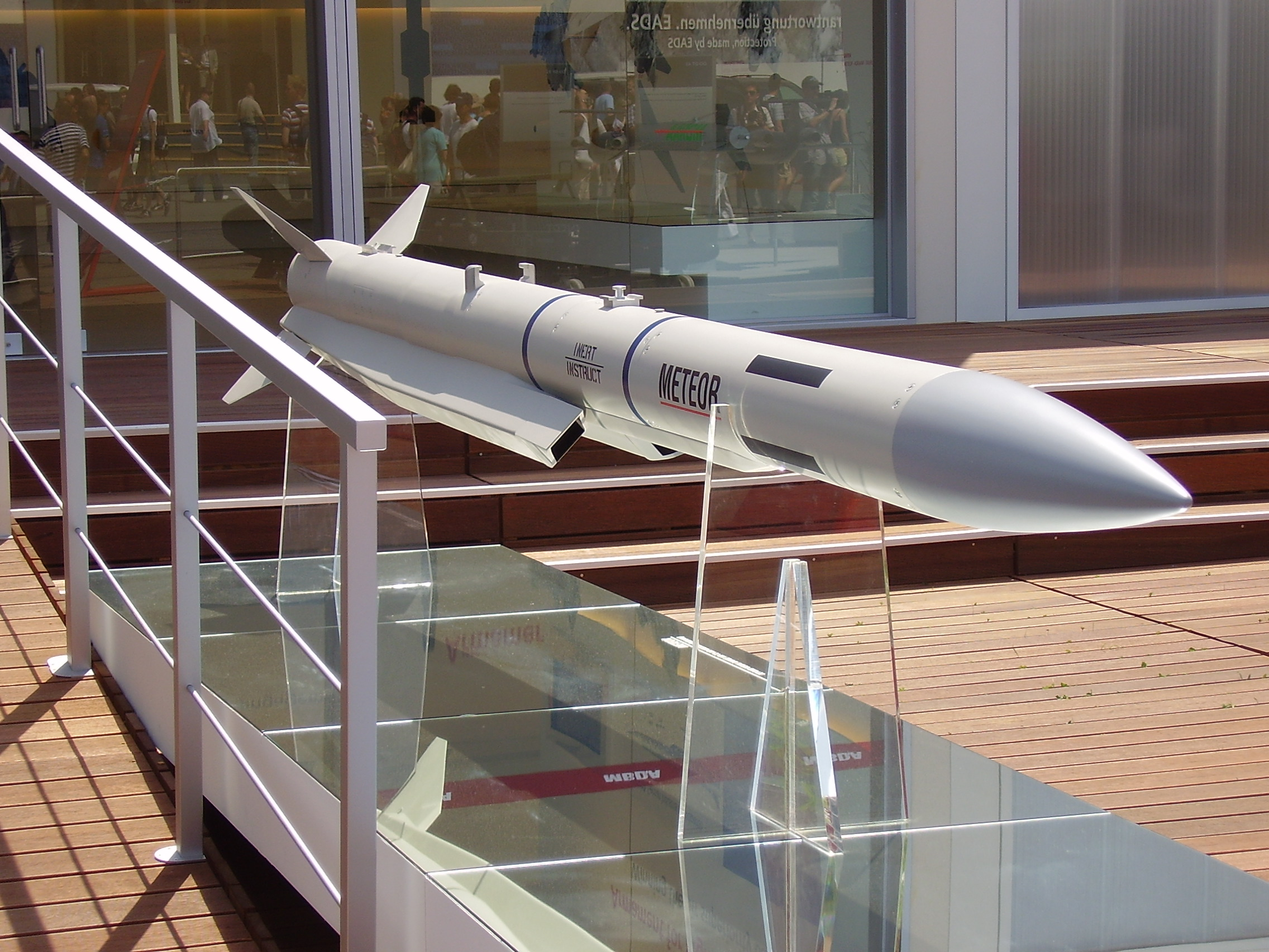 ILA 2008